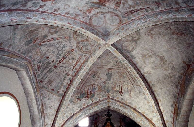 Anderslöv kyrka i Skåne, Sverige. Korhvælv